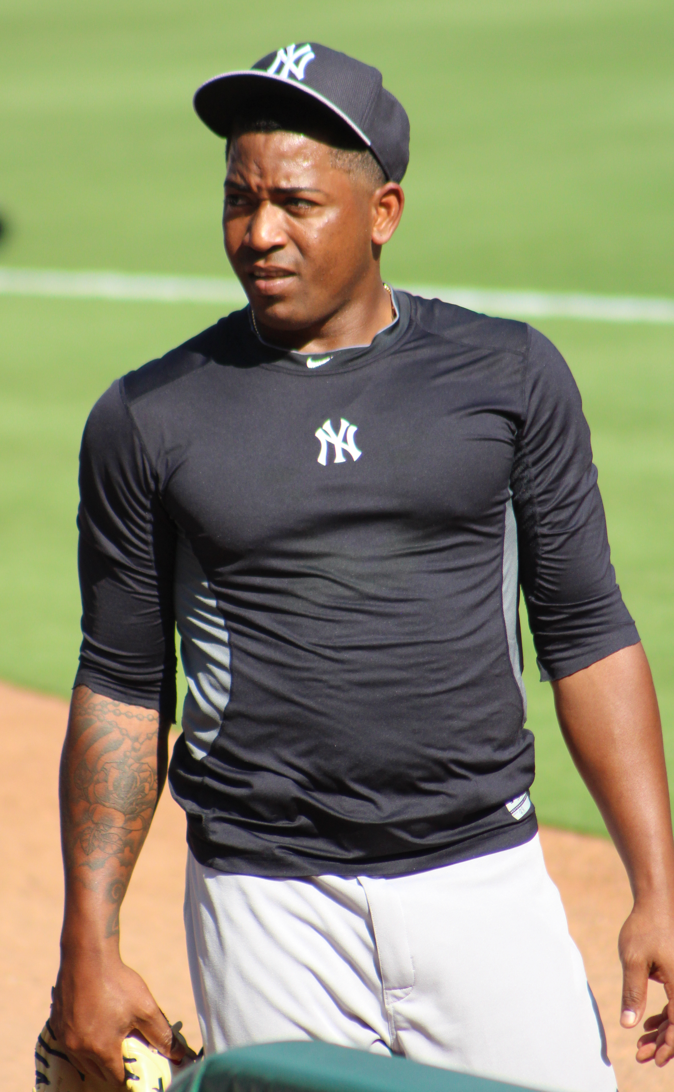 Diego Moreno